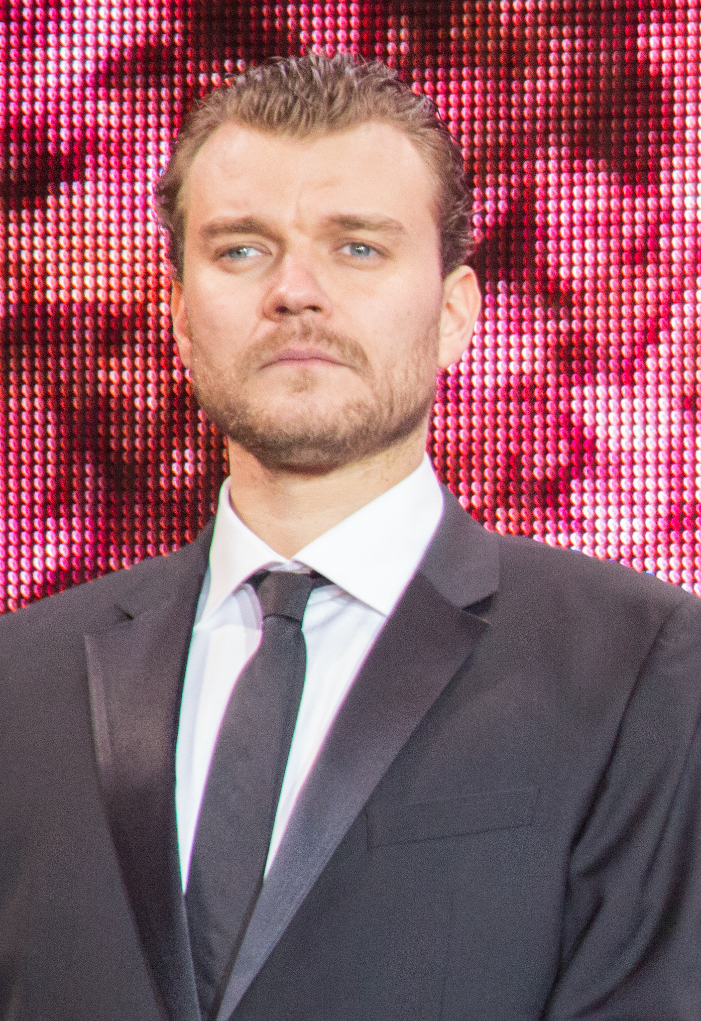 ゴースト・イン・ザ・シェル ワールドプレミアレッドカーペット ピルー・アスベック ビートたけし スカーレット・ヨハンソン